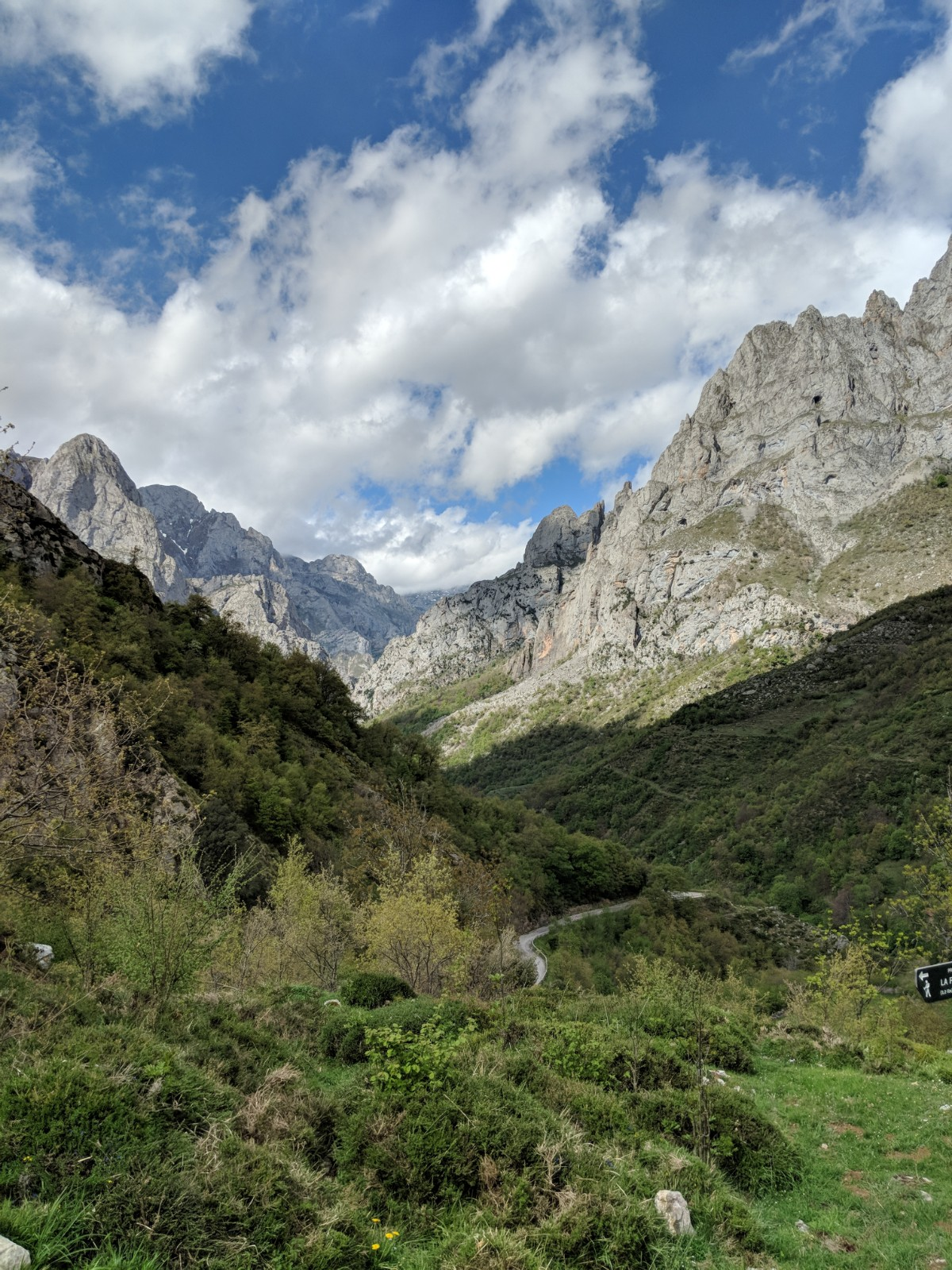 Foto sacada desde Mirador del Tombo cuando el cielo ya se despejó This is a photography of a Special Area of Conservation in Spain with the ID: ES4130003. Natura2000 entry, EEA entry